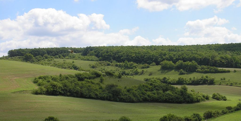 PP Roviny